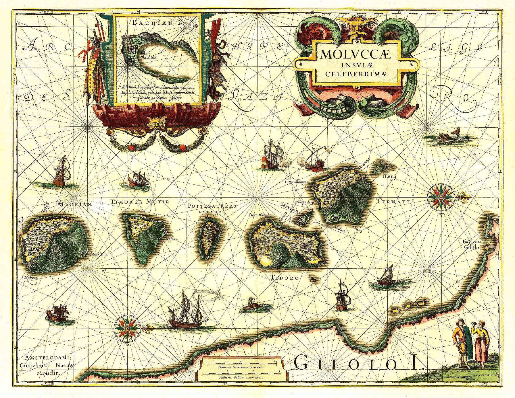 Karte der Molukken aus dem 17. Jahrhundert